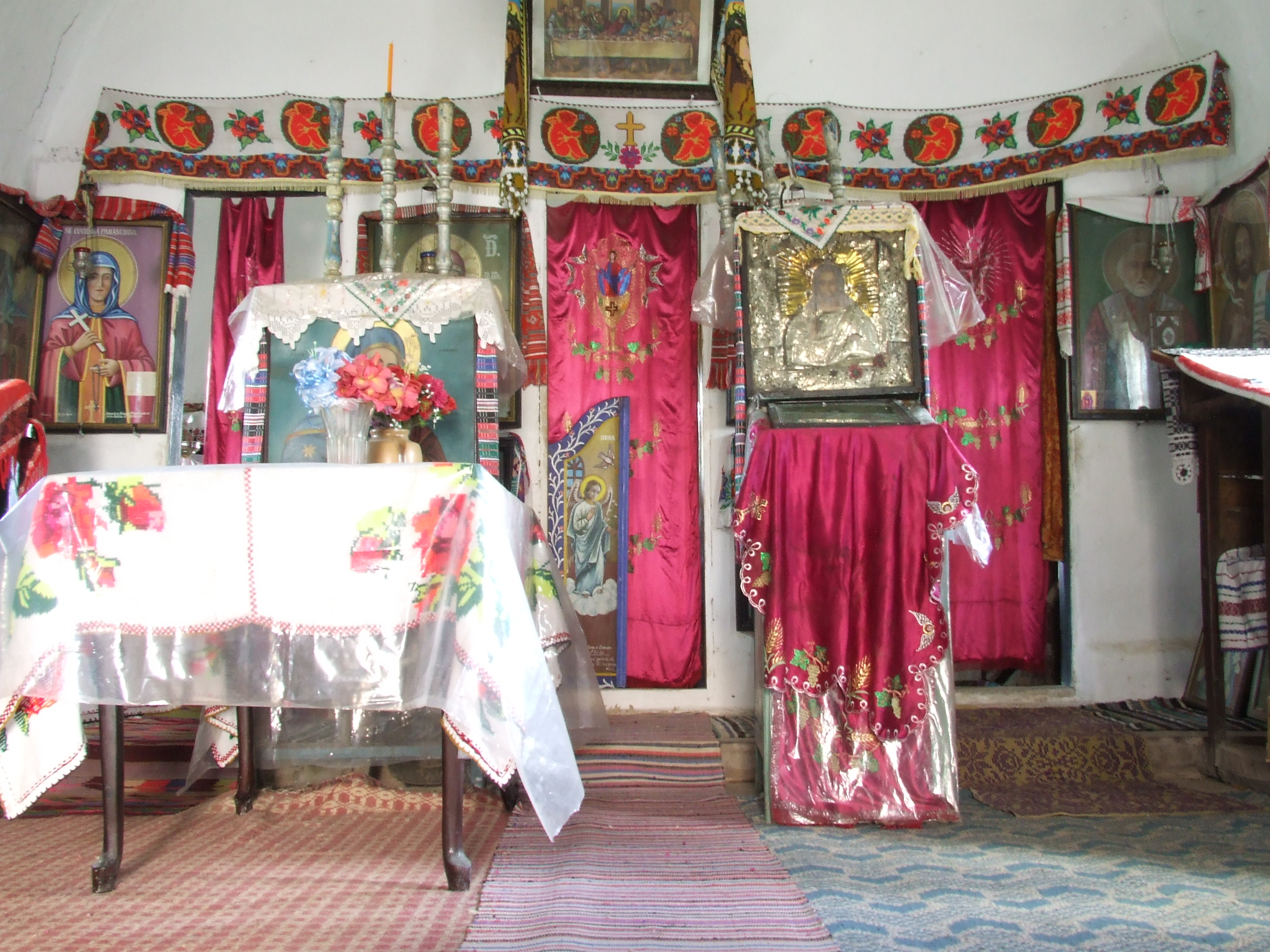 Biserica de lemn din Bratovești,județul Vâlcea.